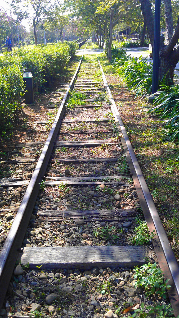 中文（台灣）: 神岡線鐵軌